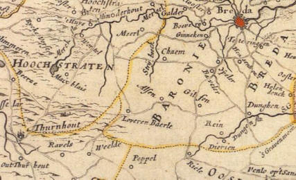 Kaart met Baarle & de Baronie van Breda.